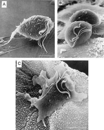 Trichomonas vaginalis in un'immagine di microscopia elettronica a scansioneM